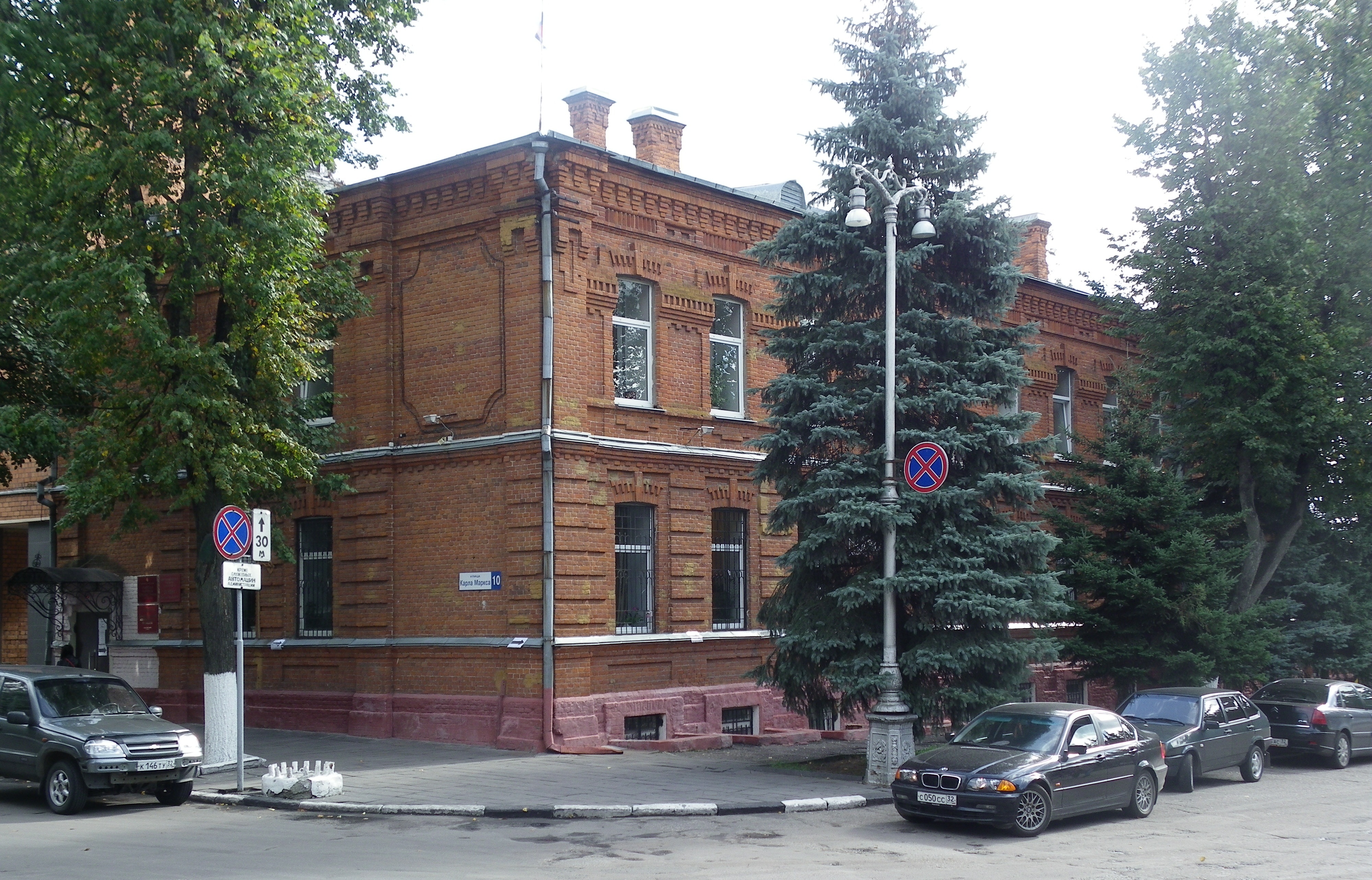 Брянск, площадь Карла Маркса (Красная пл.). Администрация Советского района